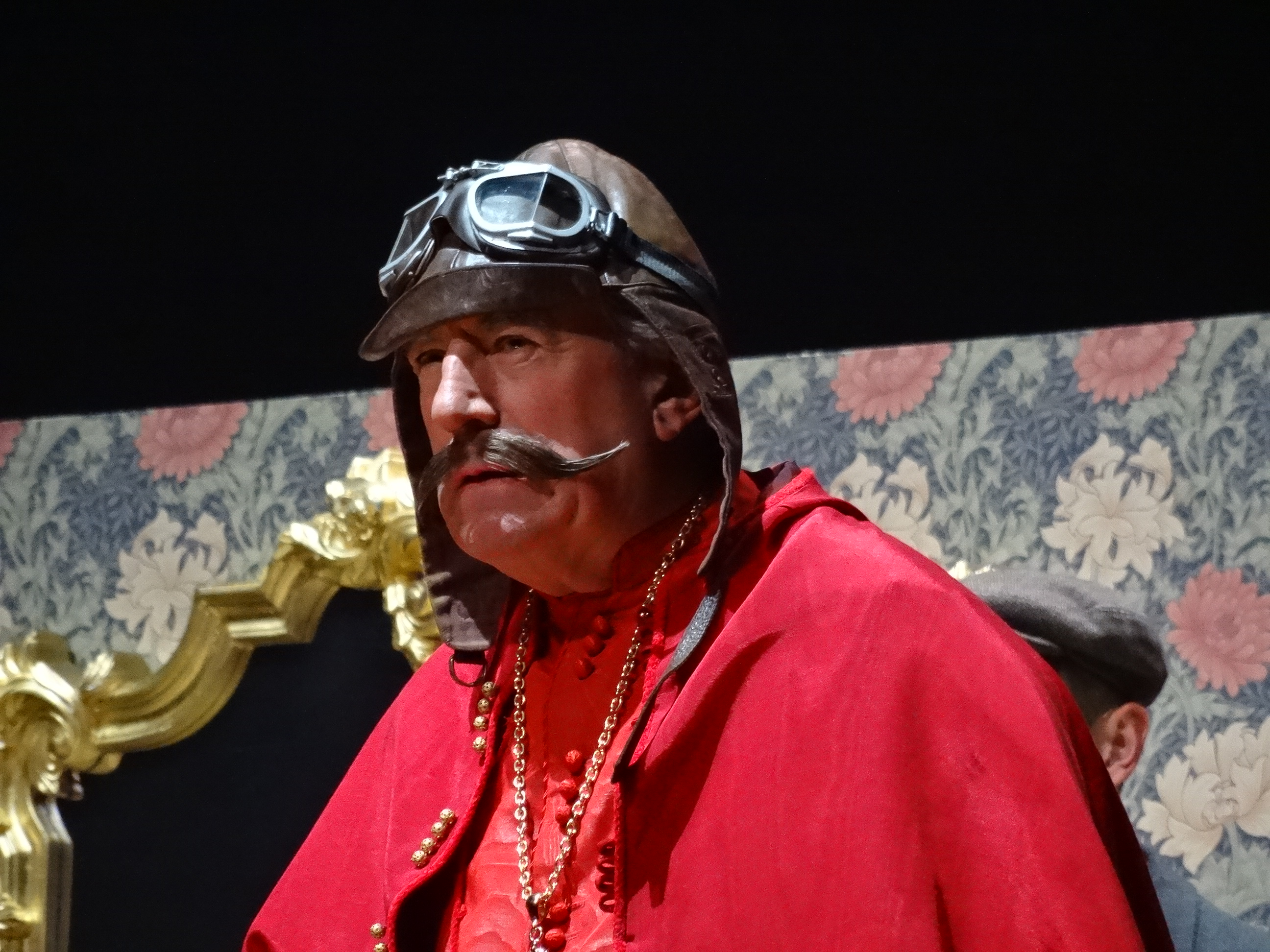 Photo 02-07-14 12 47 22